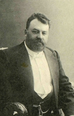 Константин Николаевич Гримм, член Государственной думы от Саратовской губернии, председатель Саратовской губернской управы.